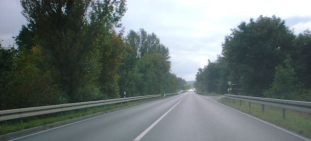 Bundesstraße B 273 auf dem Damm der Brücke über den Sacrow-Paretzer Kanal bei Marquardt nördlich von Potsdam, Blick nach Südosten.